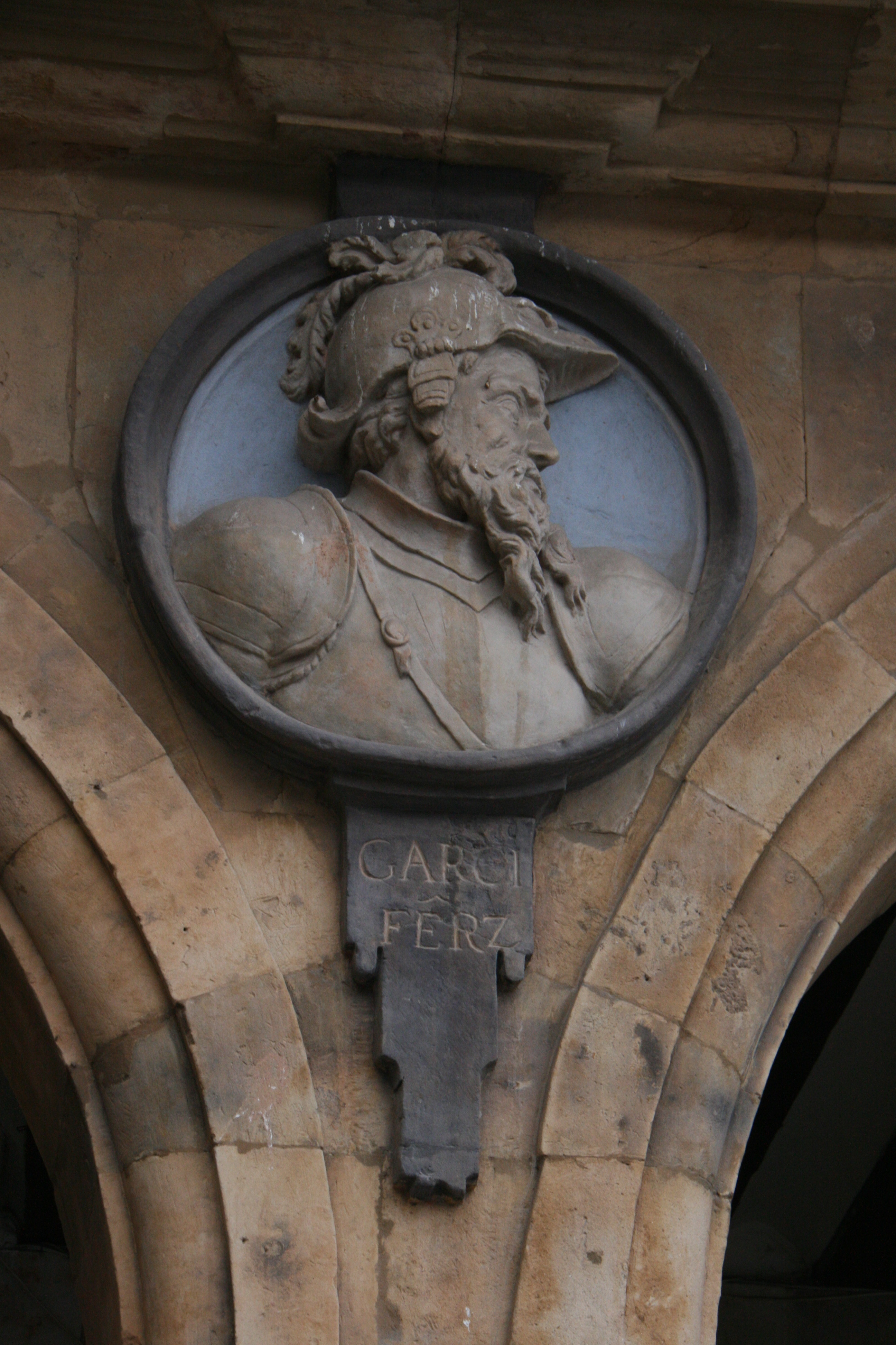 Medallón del conde García Fernández conocido por el de las Manos Blancas